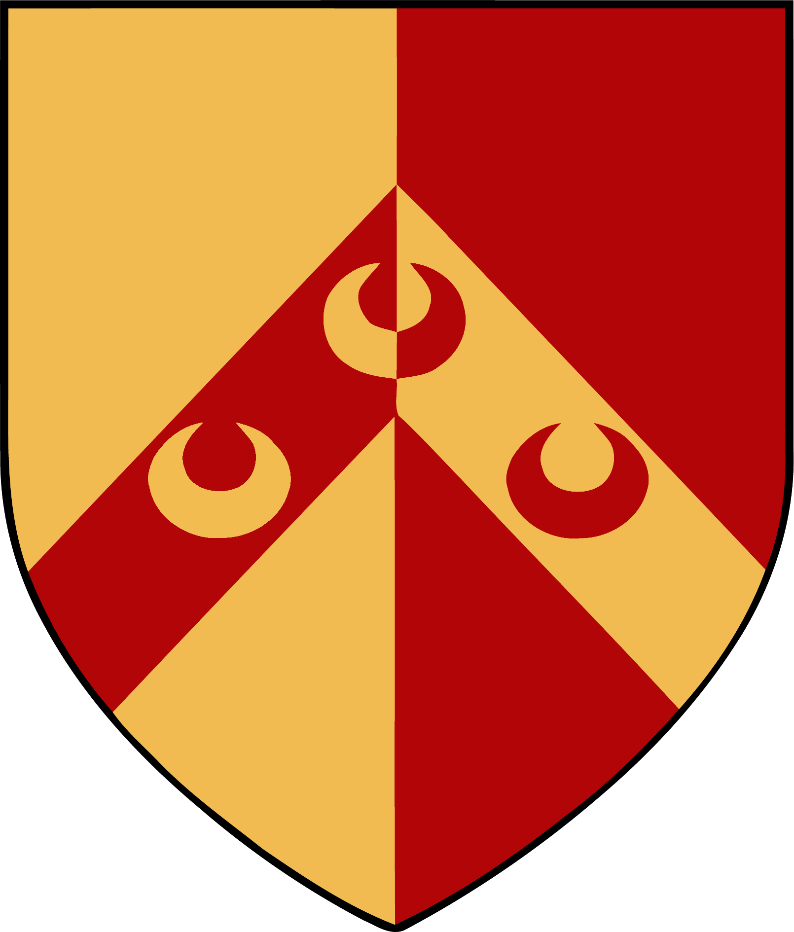 грб Златоносовића, рад урађен на основу илирских грбовника